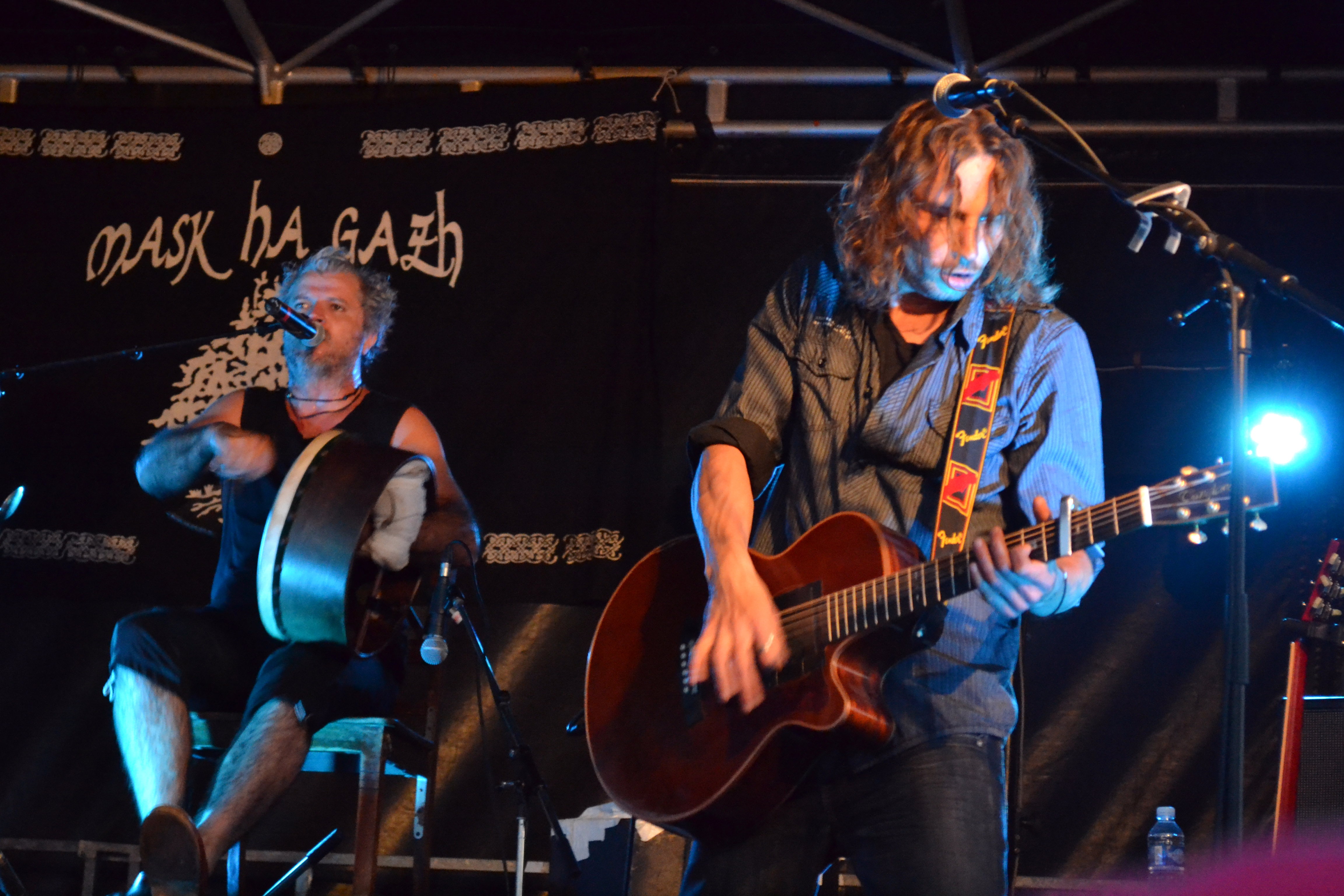 Le groupe de rock celtique Mask ha Gazh lors des Mardis de Plouescat dans le Finistère le 16 juillet 2013.